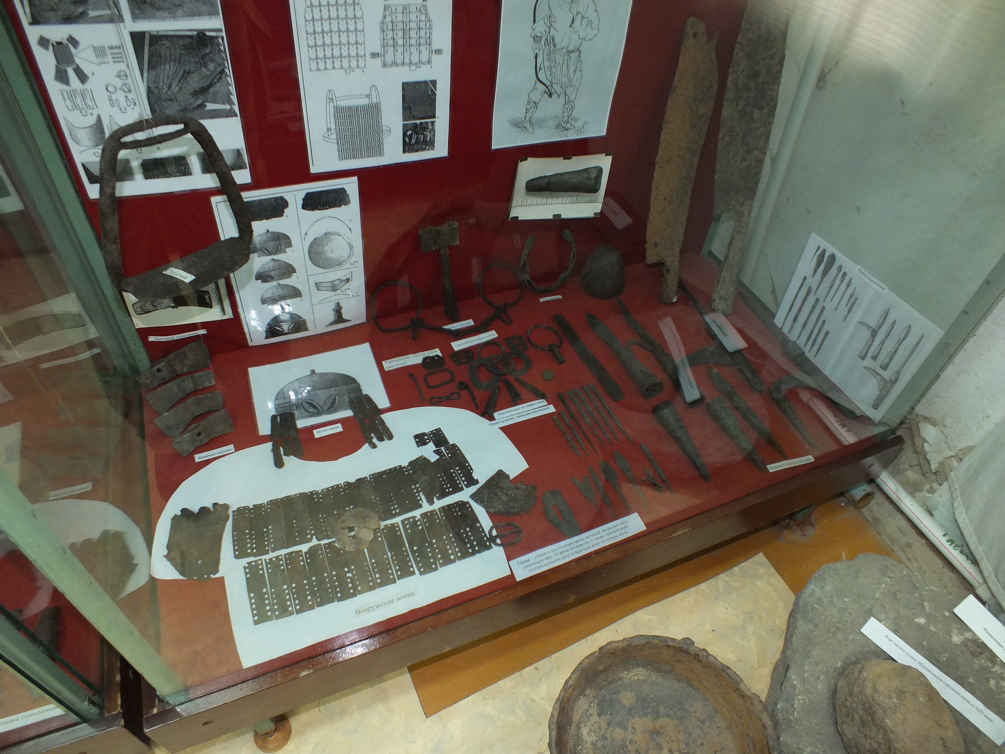 Olga, Primorsky krai